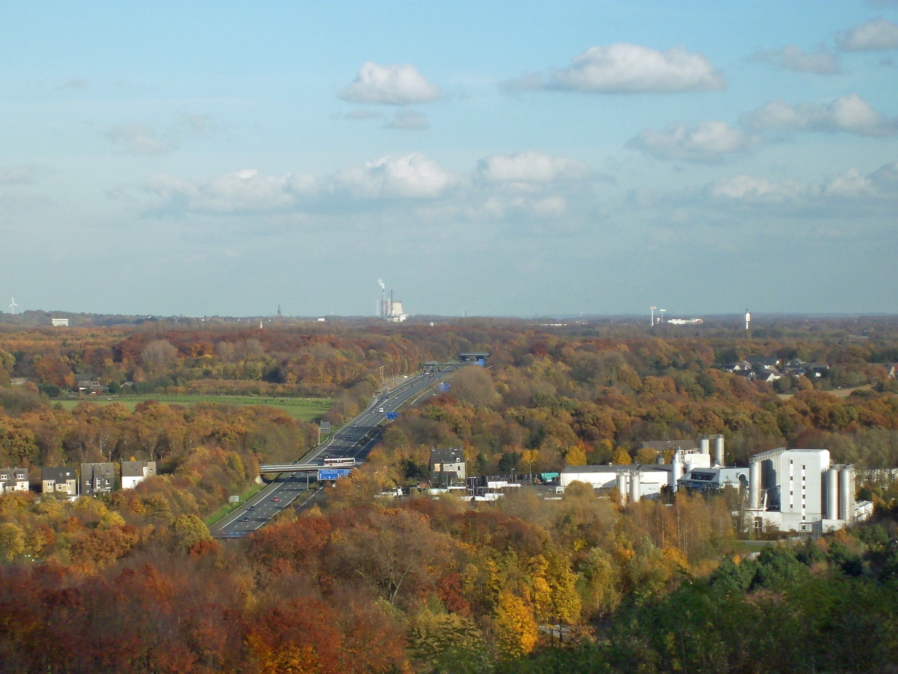 Bundesautobahn A-2 bei Recklinghausen Hochlamarck